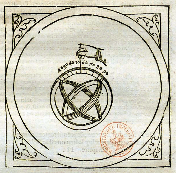 Anneau astronomique à trois cercles de Gemma Frisius